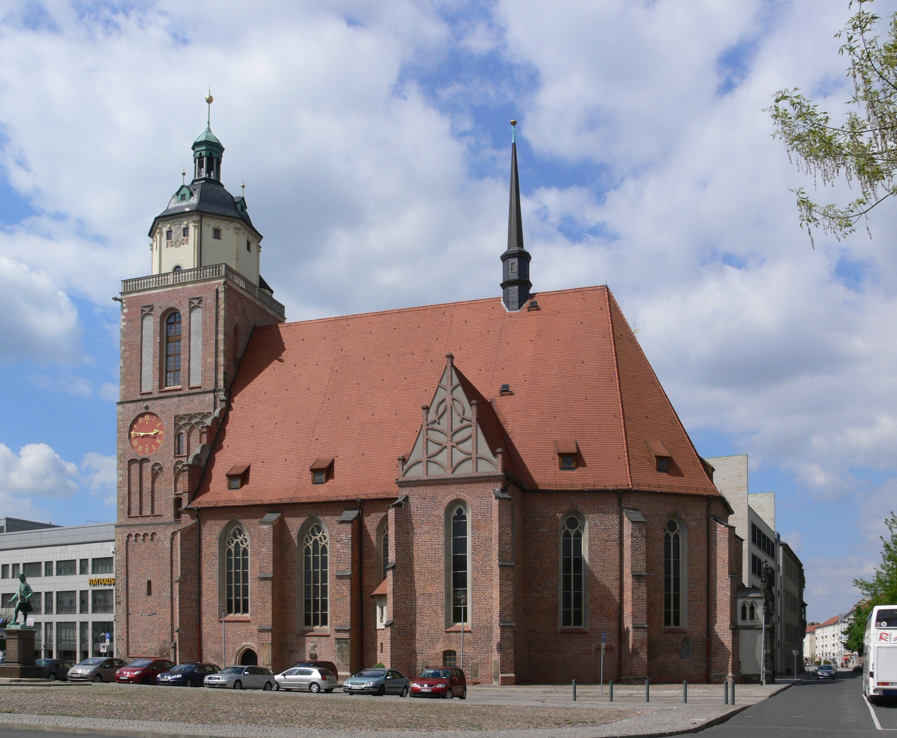 Dessau, Marienkirche